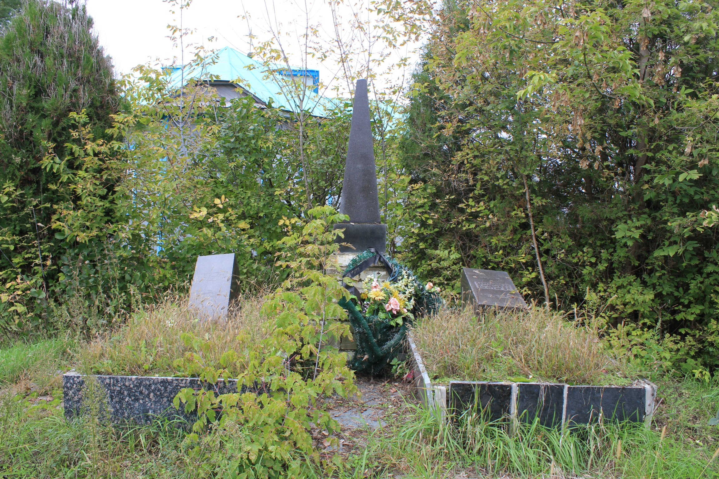 Братська могила активістів села, які загинули за встановлення Радянської влади, село Строкова, біля церкви